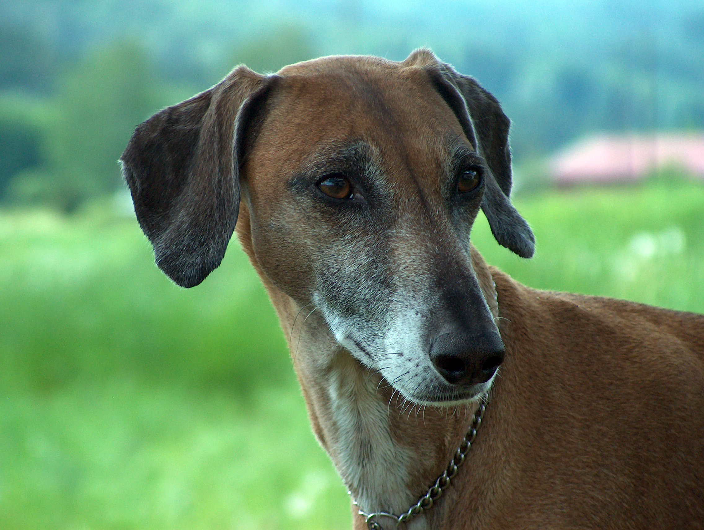 Azawakh bitch